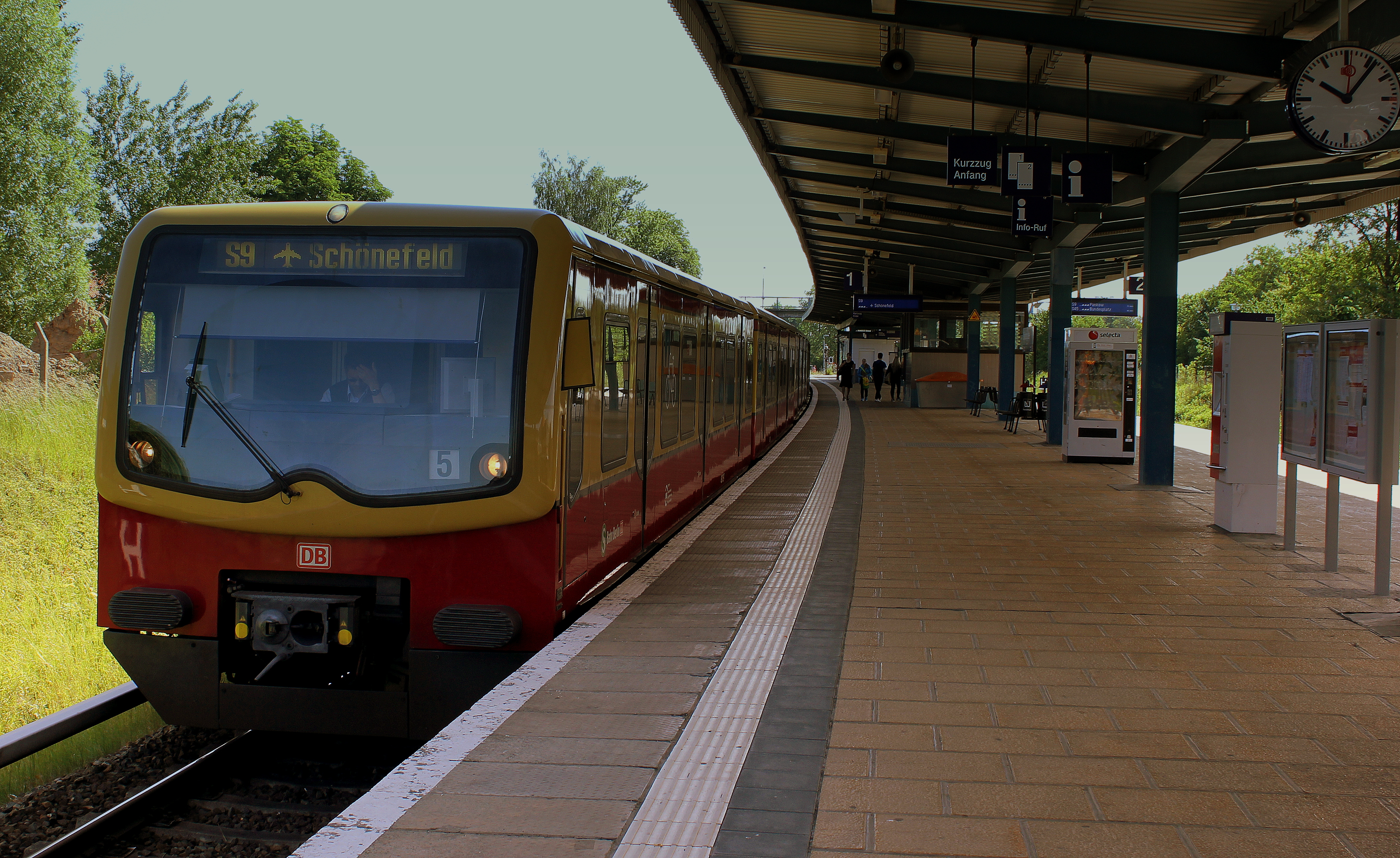 DB S9 TRAIN BOUND FOR SCHONEFELD AIRPORT BAHNHOF AT GRUNBERGER ALLEE BERLIN GERMANY JUNE 2013